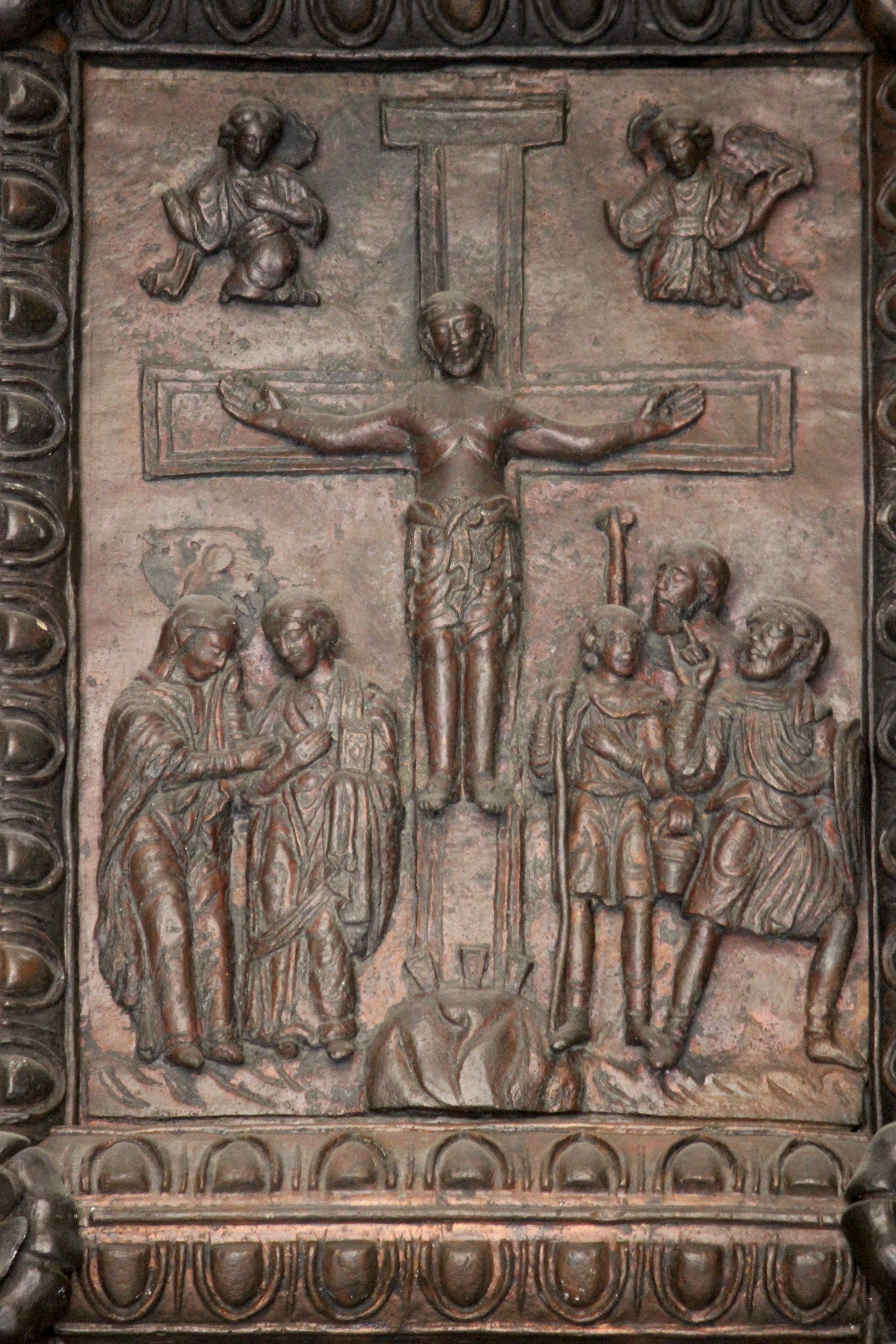 Benevento. Catedral, puerta de bronce románica, atribuida (al menos en parte) a Oderisio da Benevento. s. XII.